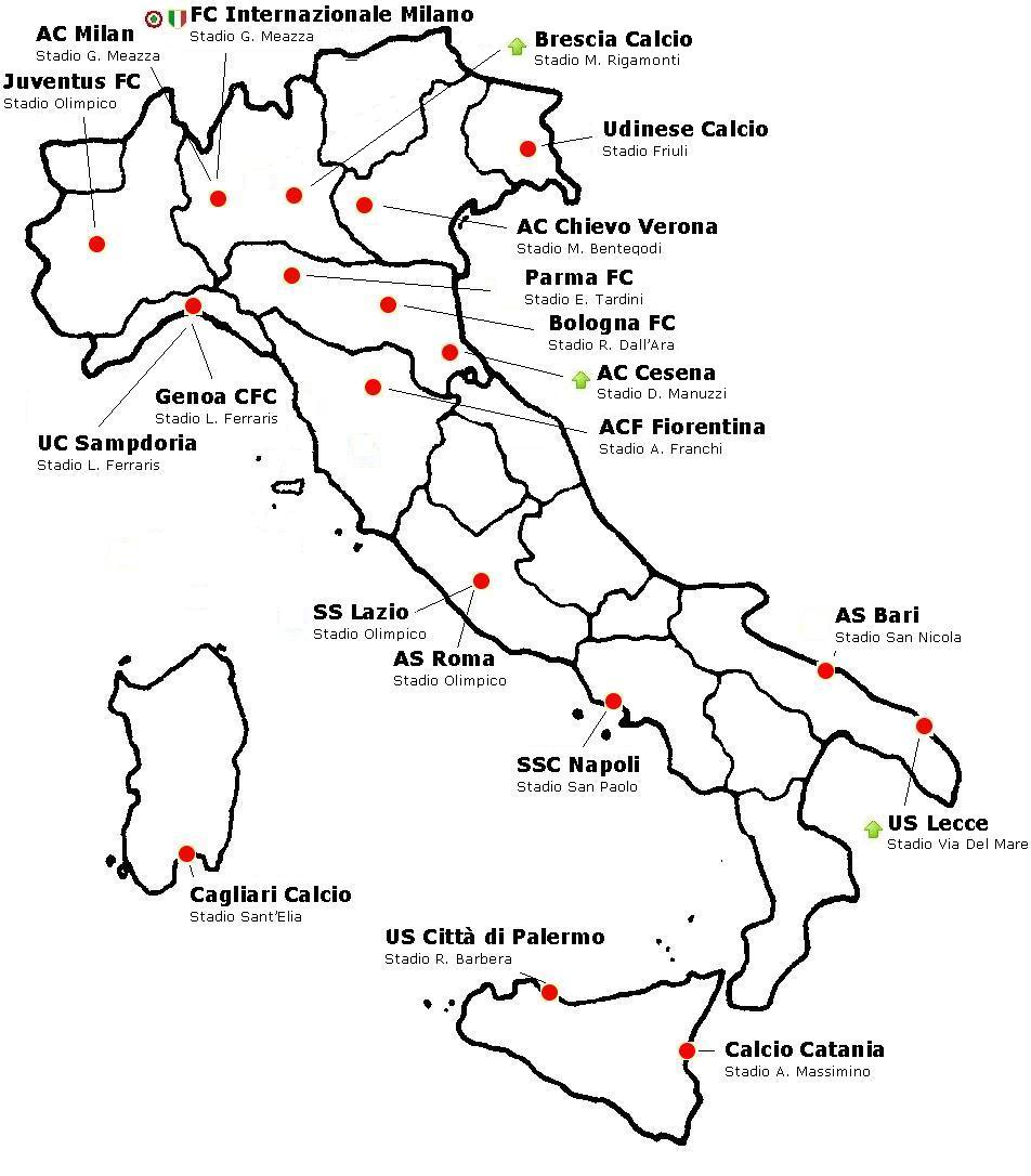 Distribuzione geografica squadre serie a 10-11